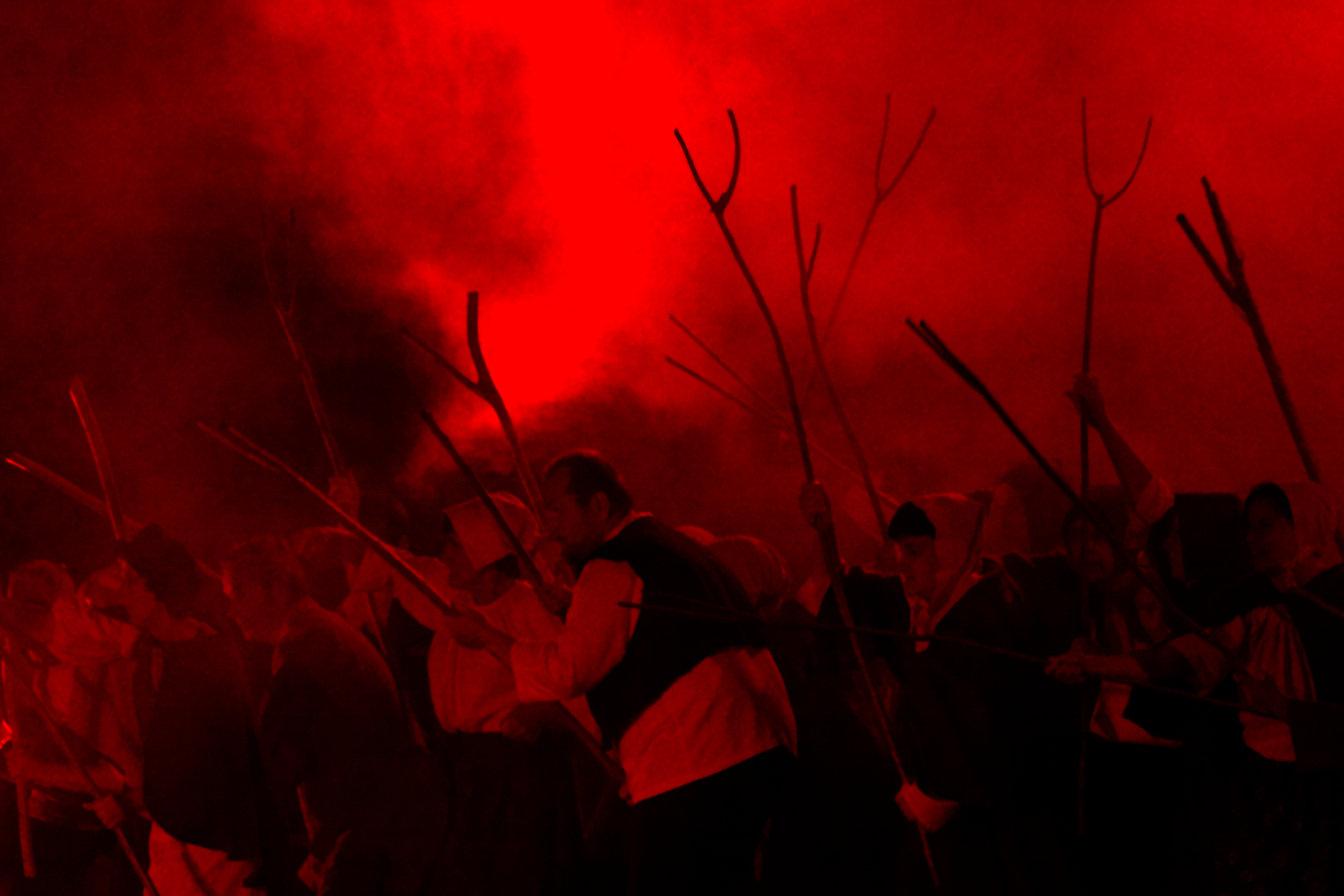 Spectacle (Folgoët?) Ar vro Bagan 2 juillet 2010